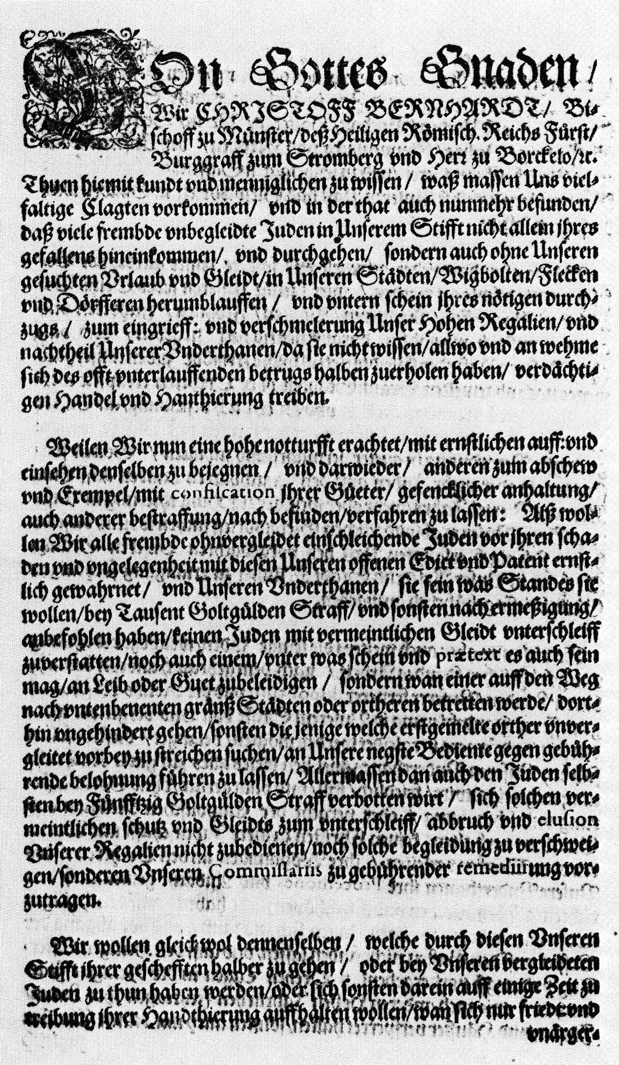 Judenordnung des Hochstifts Münster, erlassen von Fürstbischof Christoph Bernhard von Galen.